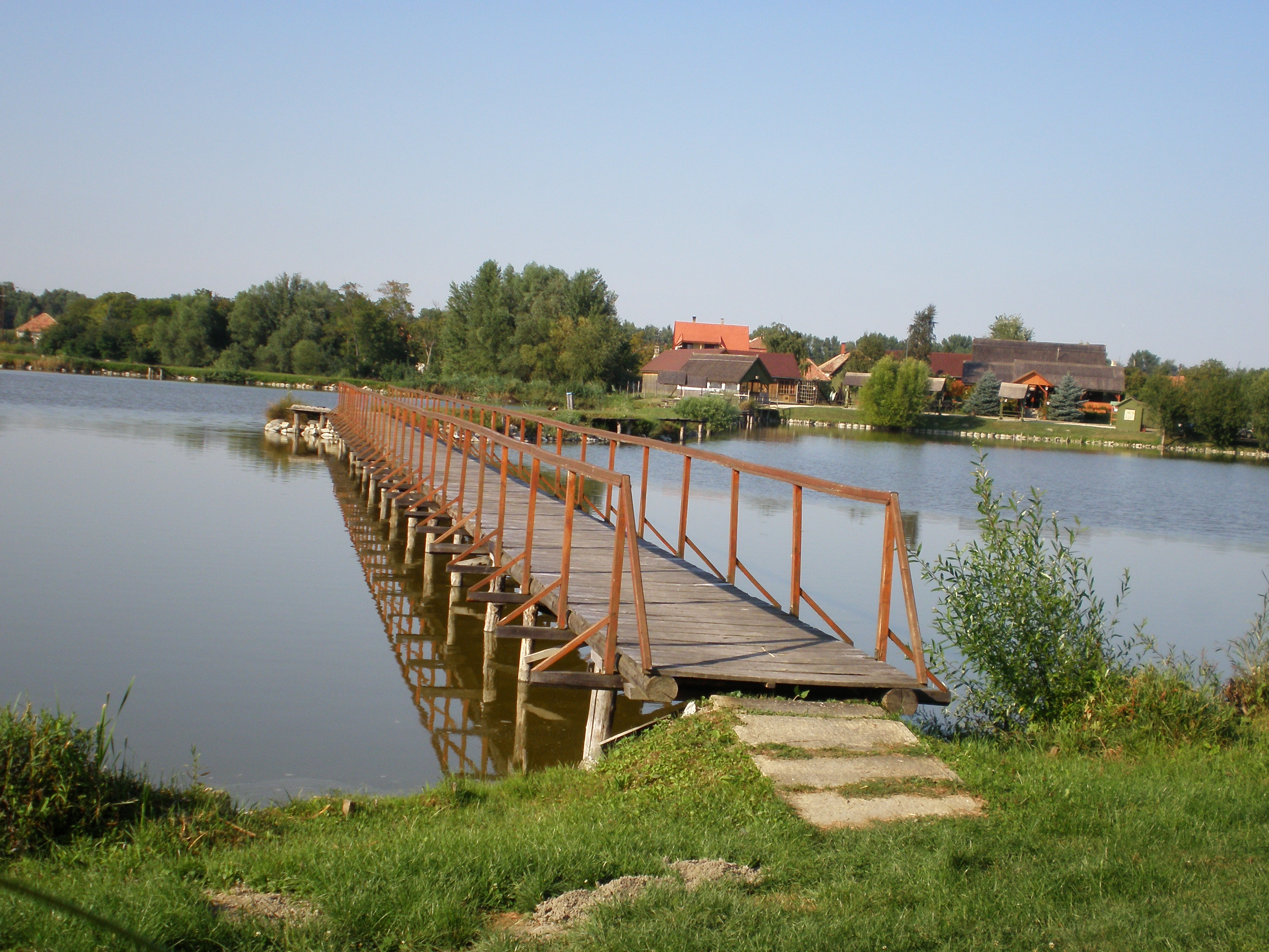 Nagybajcsi halastó (Nagybajcs, Győr-Moson-Sopron megye, Magyarország)